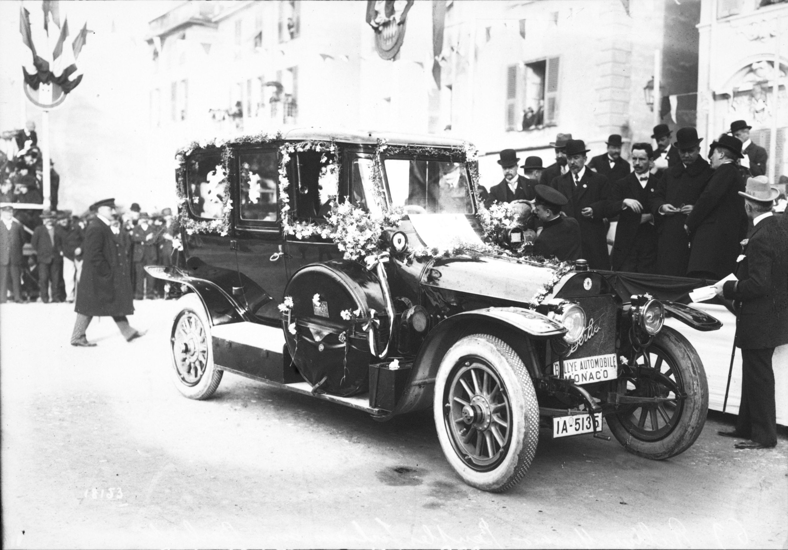 Jules Bentler ganador del Rally de Montecarlo de 1912.